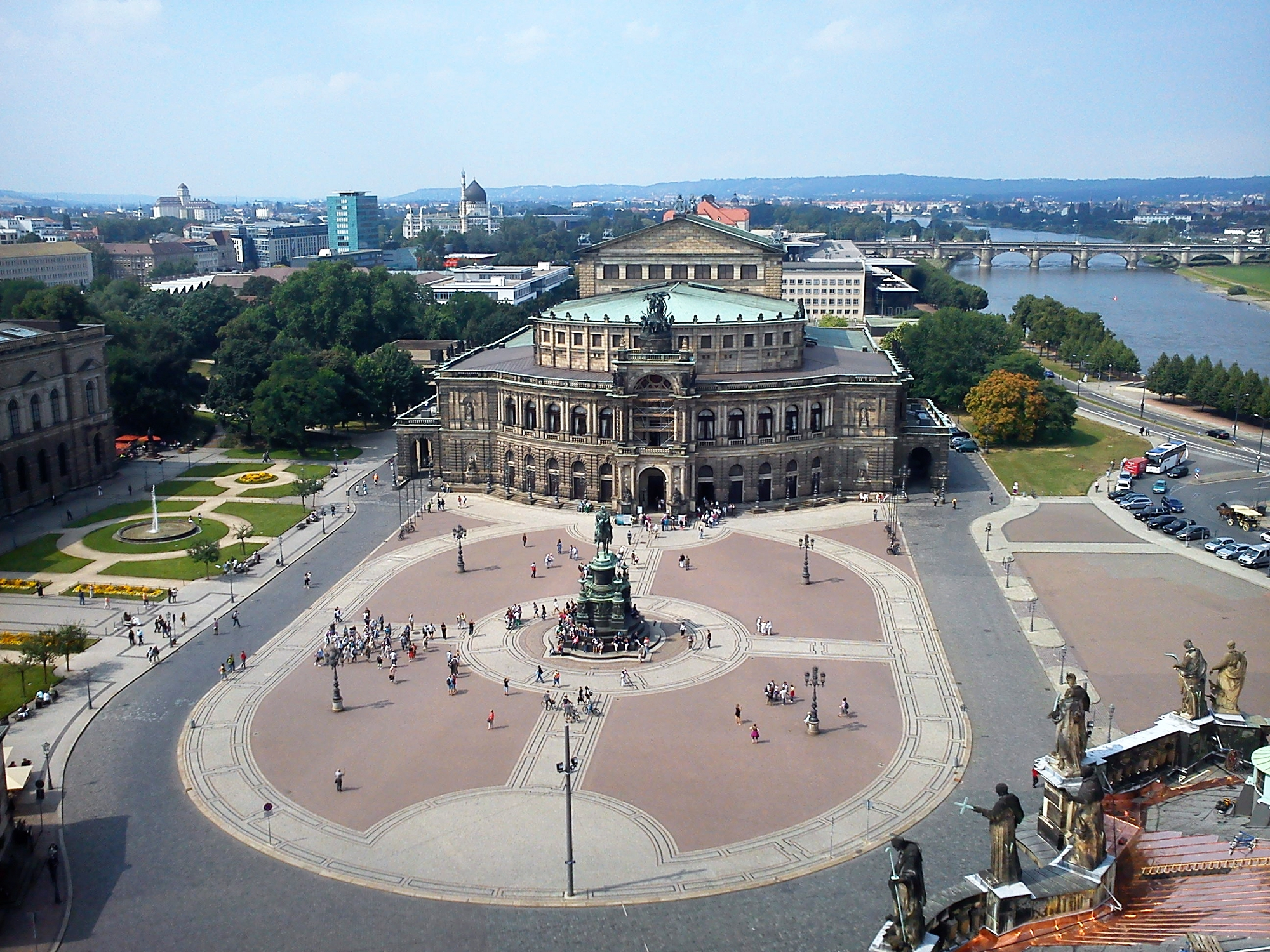 Semperoper Dresden vom Hausmannsturm des Dresdner Residenzschlosses aus betrachtet